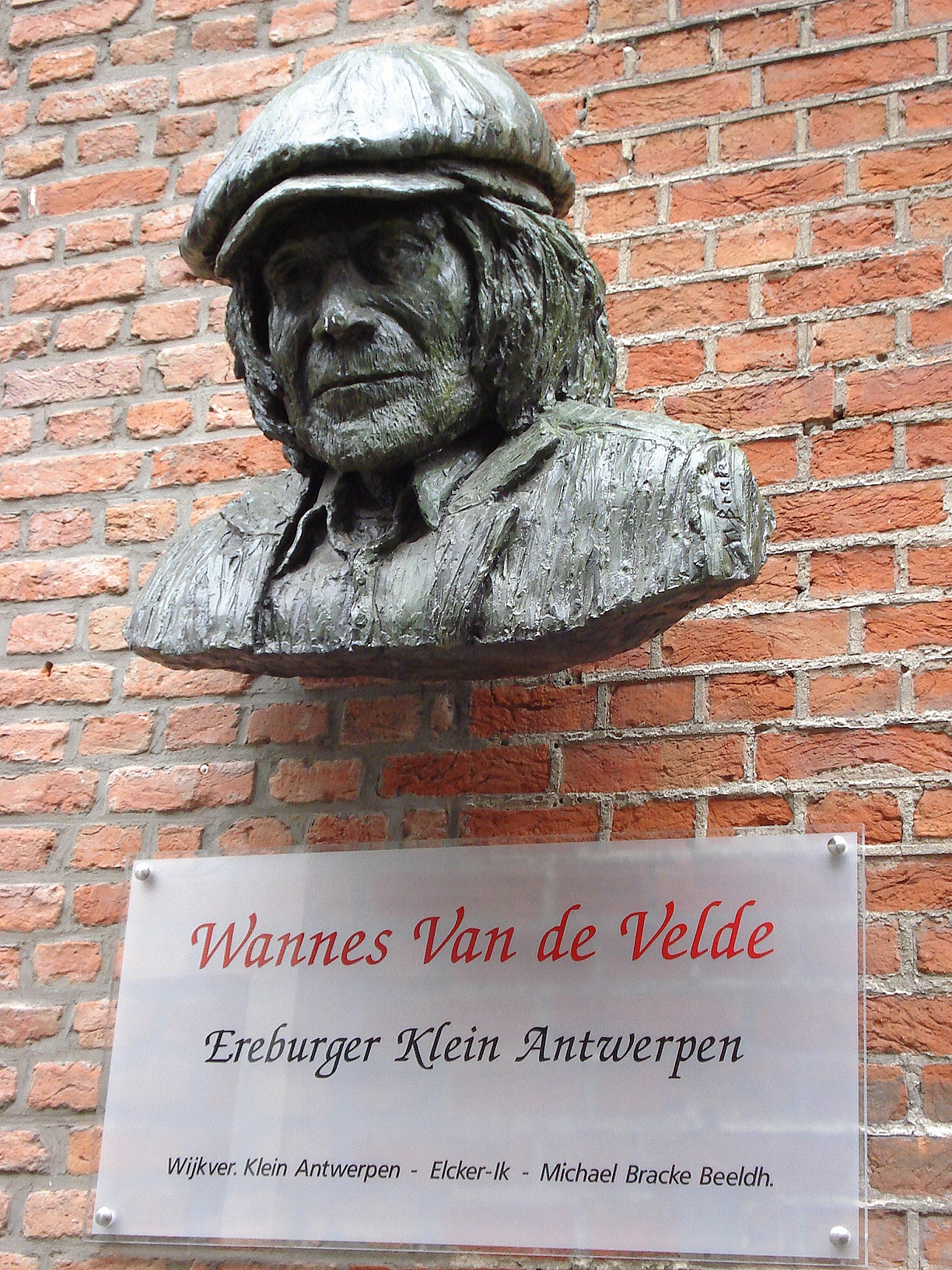 Beeld Wannes Van de Velde tegen gevel buurthuis Elcker-Ik, Breughelstraat Antwerpen. Beeldhouwer: Michael Braecke